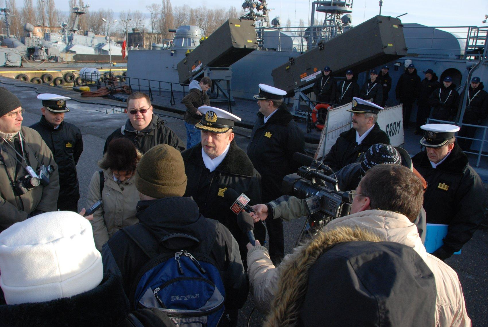 wadm. Andrzej Karweta - Konferencja prasowa Marynarka Wojenna 2008